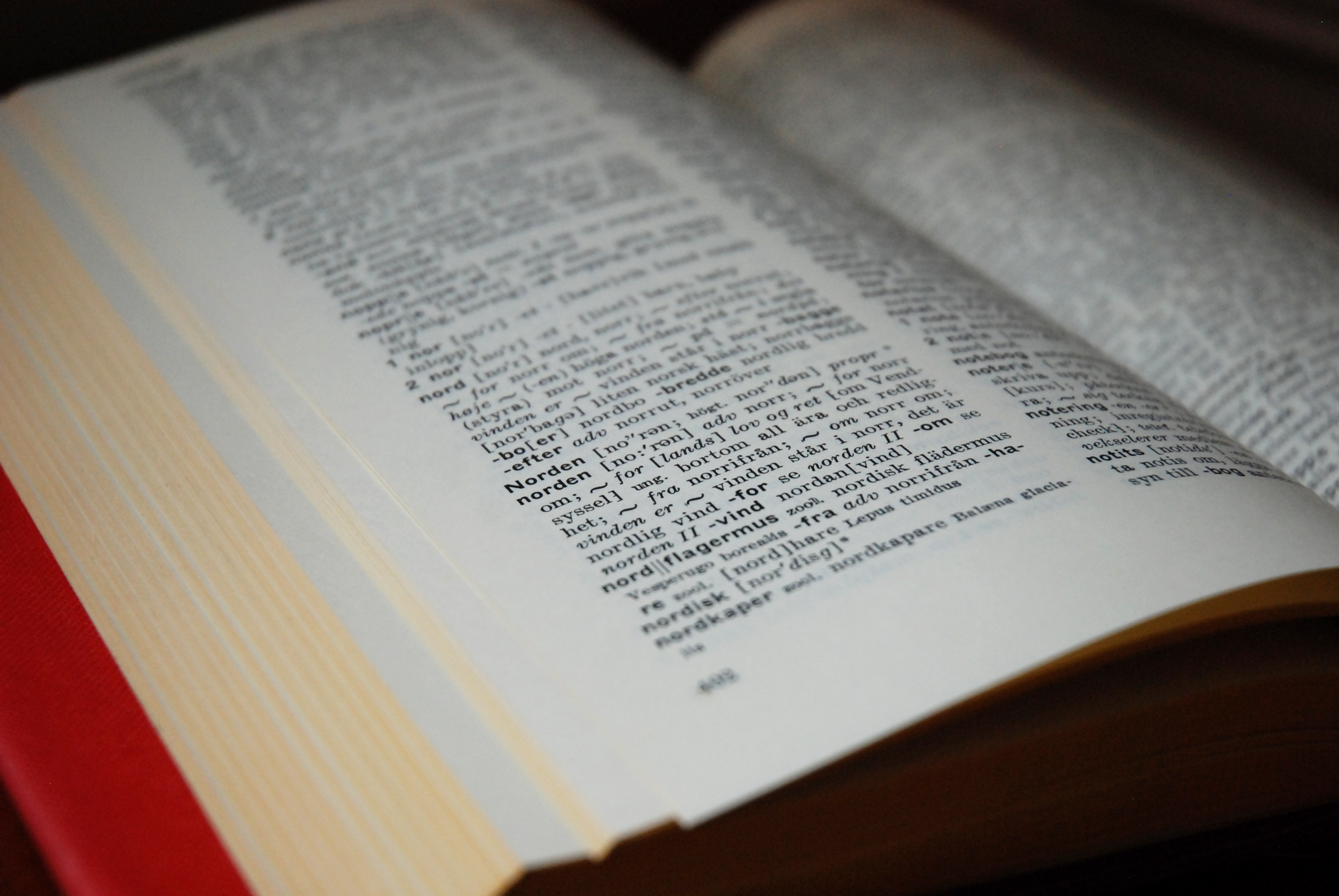 Ordbog